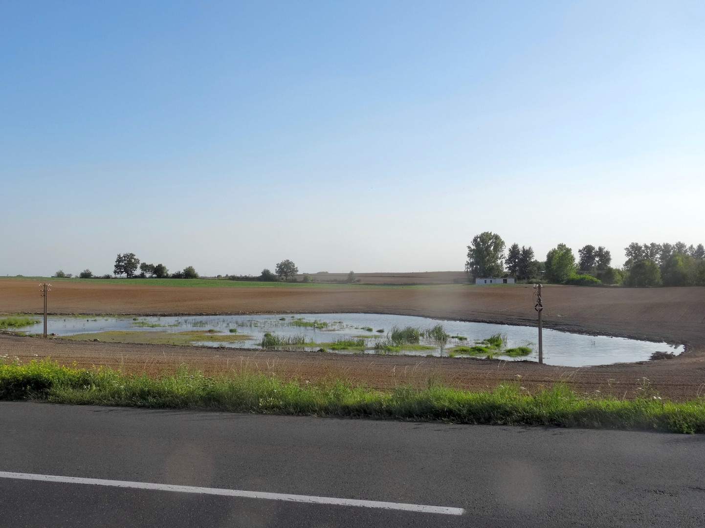 Oczko wodne koło wsi Trzemiętowo w powiecie bydgoskim